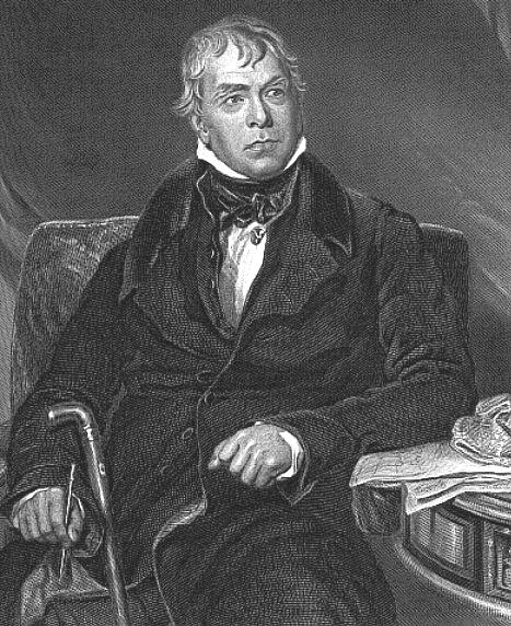 Walter Scott, aufgehellte Version